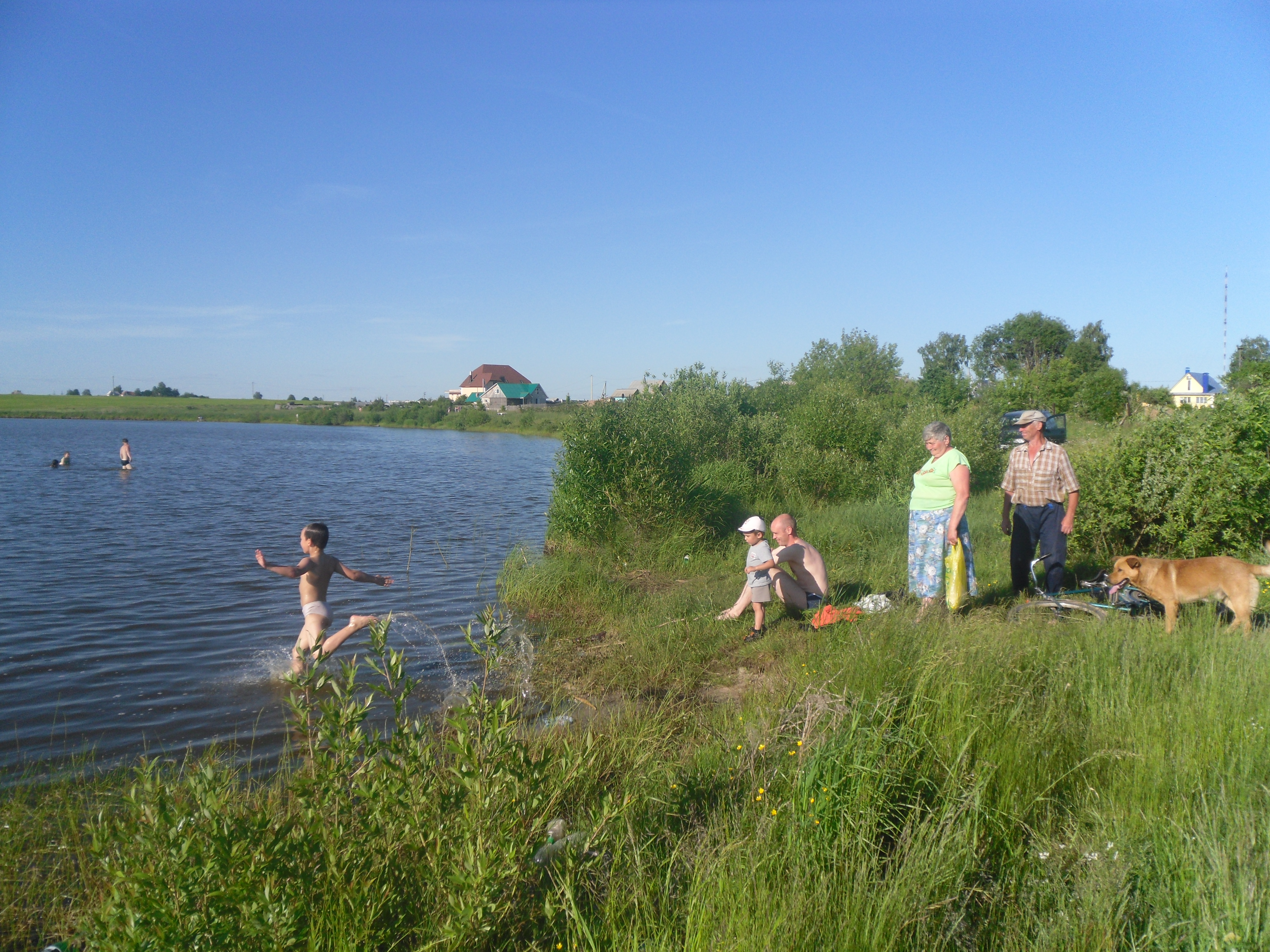 Озеро близ деревни Жуково